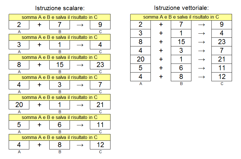 Comparativa tra istruzione vettoriale e istruzione scalare